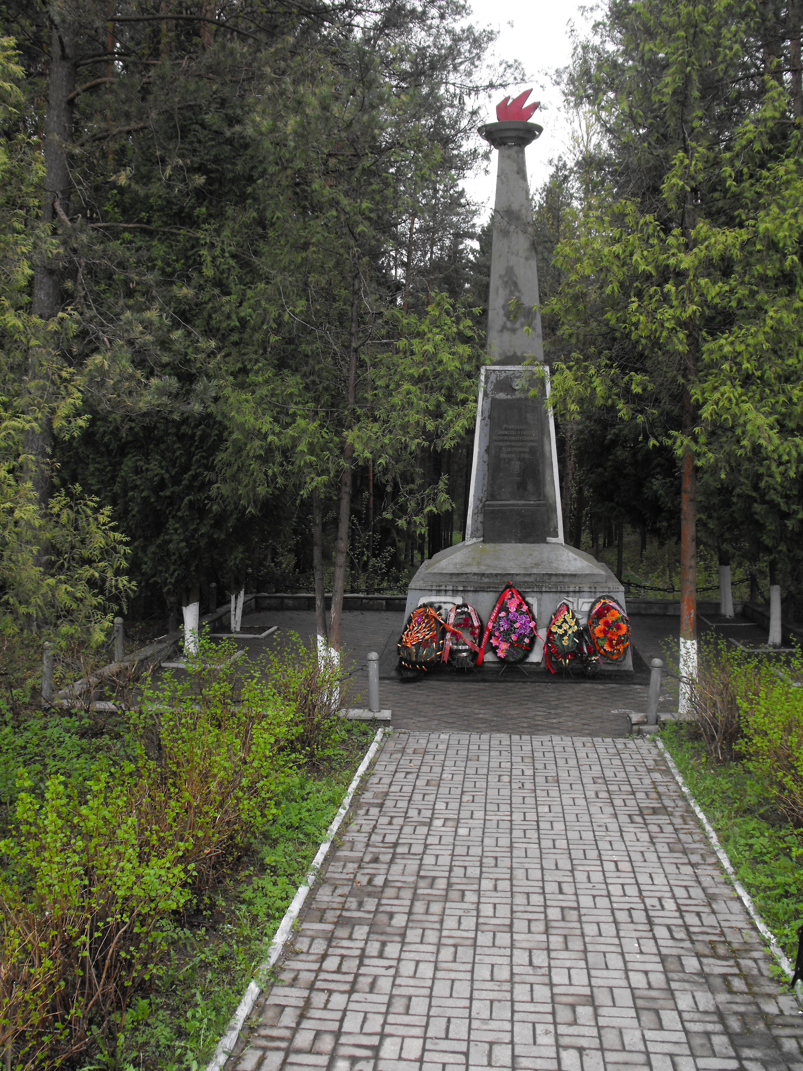 Мемориал на месте убийства нацистами узников Борисовского гетто. Находится в Борисове на обочине улицы Лопатина - примерно напротив через дорогу от инфекционной больницы (улица Лопатина, 172).